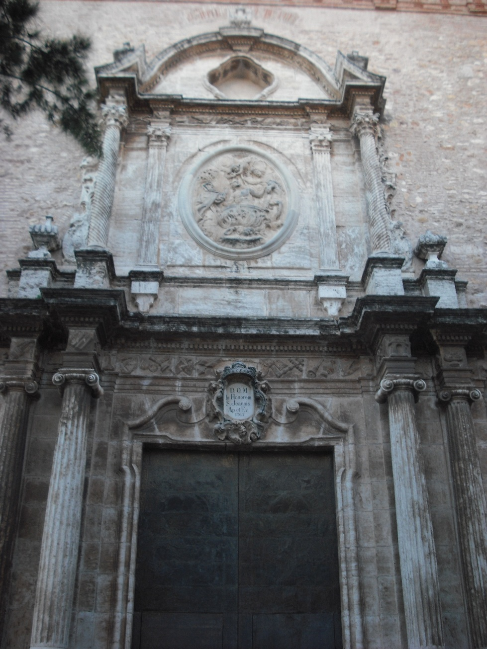 Portada de l'Església de Sant Joan Evangelista de Massamagrell